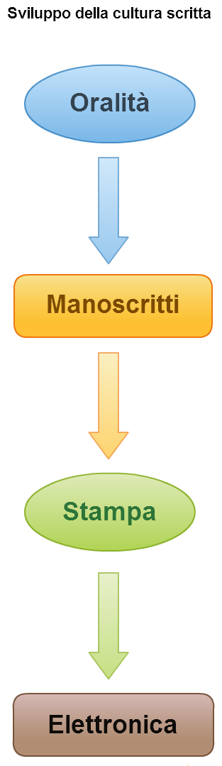 Diagramma dello sviluppo culturale del libro.